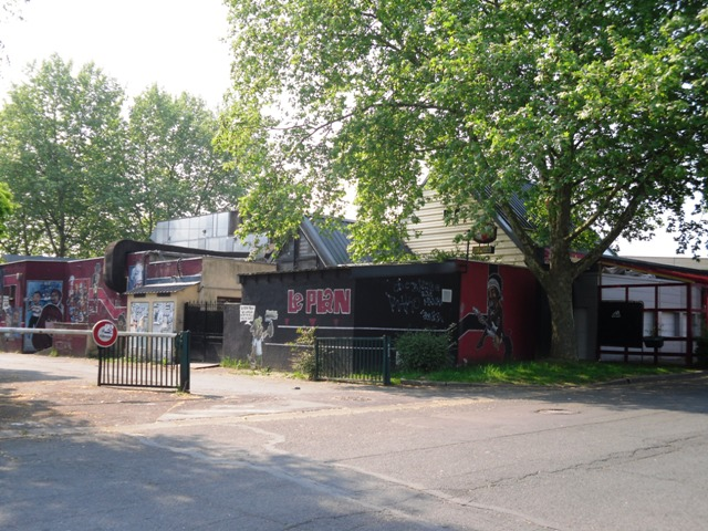 La salle de concert Le Plan à Ris-Orangis (91)